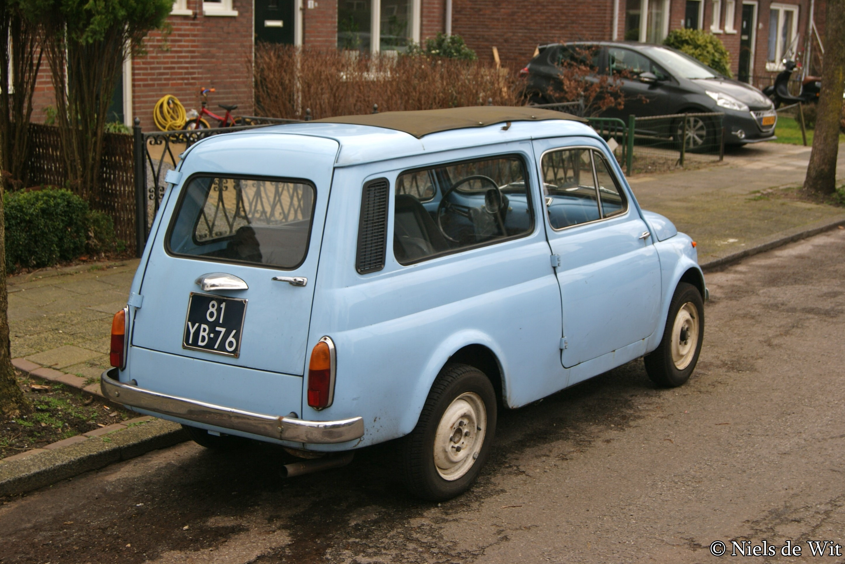 81-YB-76